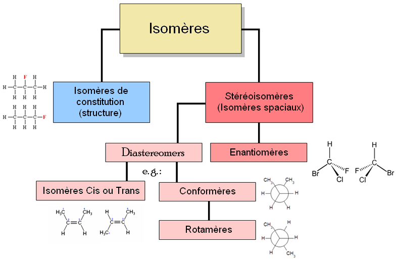 Traduction de la version anglaise récupérée depuis Wikimedia Commons